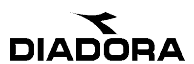 Logo Diadora